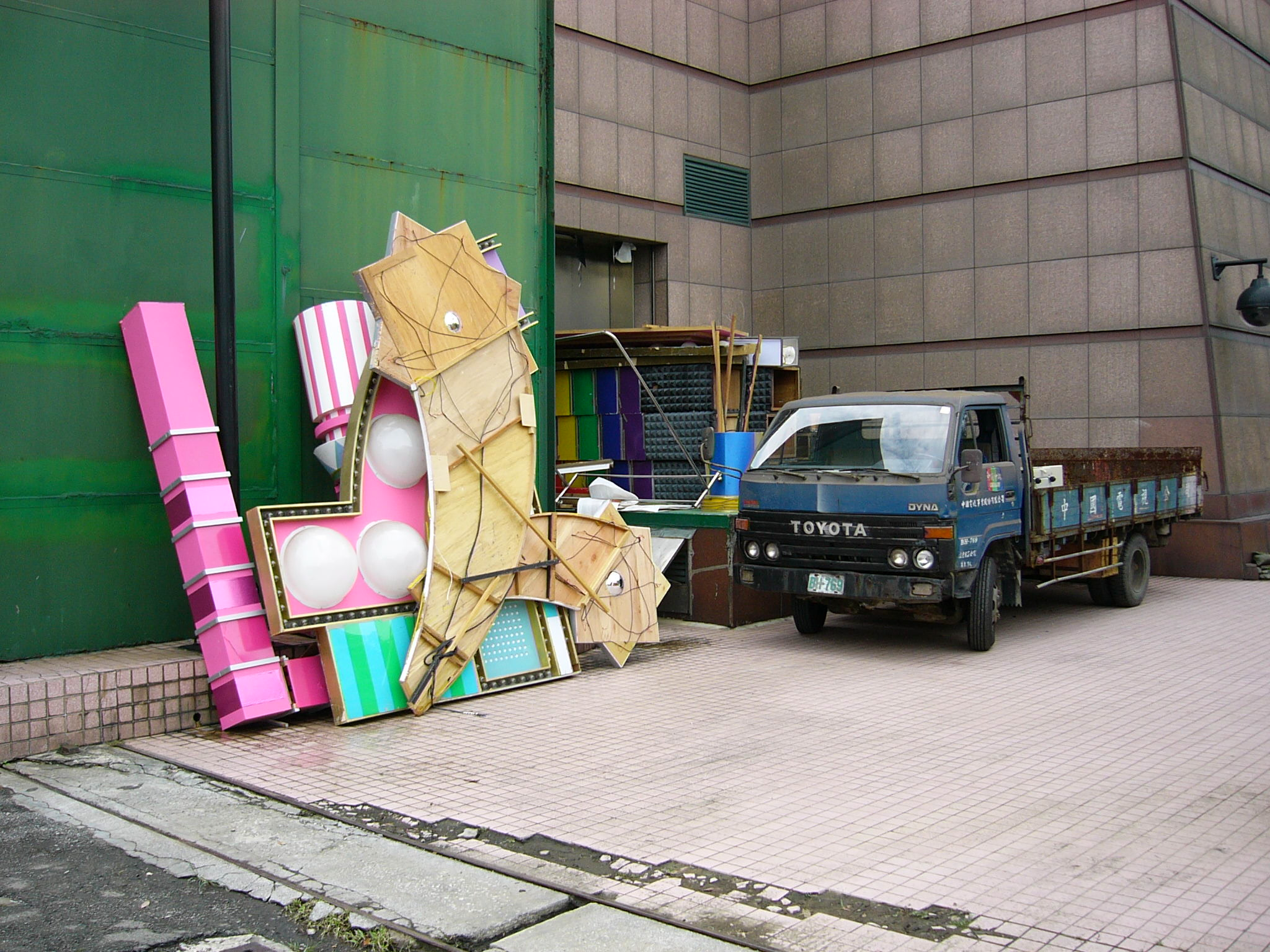 中國電視公司綜藝節目《綜藝大哥大》2000年代末代佈景之景片，放置於中國電視公司第二大樓後方。右方是中國電視公司豐田Dyna貨車BH-769。